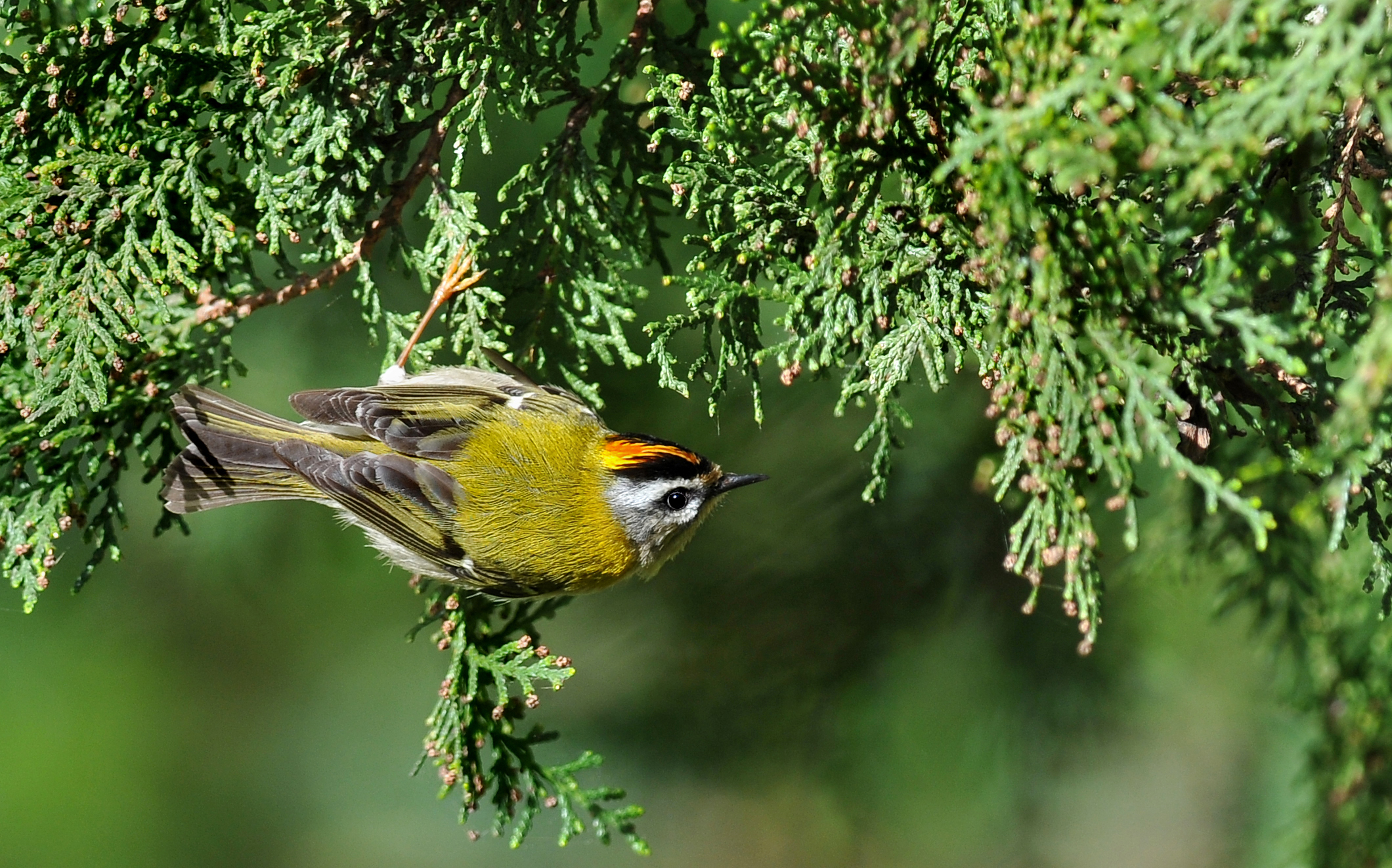 Foto tirada no parque D. Carlos I - Caldas da Rainha